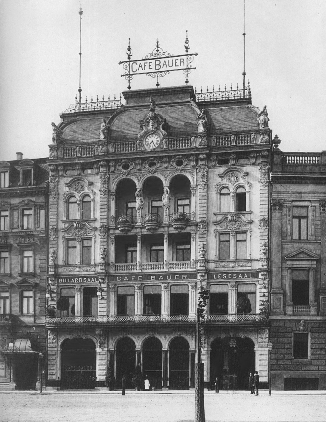 Cafe Bauer in Leipzig, Roßplatz Nr. 6, um 1900. Der viergeschossige Wohn- und Geschäftshauskomplex wurde 1889/90 nach Plänen des Berliner Architekten Albert Bohm (1853–1933) errichtet. Es war eines der bedeutendsten Gebäude des Historismus in Leipzig. Die Fassade vereinte Elemente der Renaissance mit denen von Barock und Rokoko und war mit reichlich figürlichem Schmuck versehen. Zerstört im Jahre 1943.